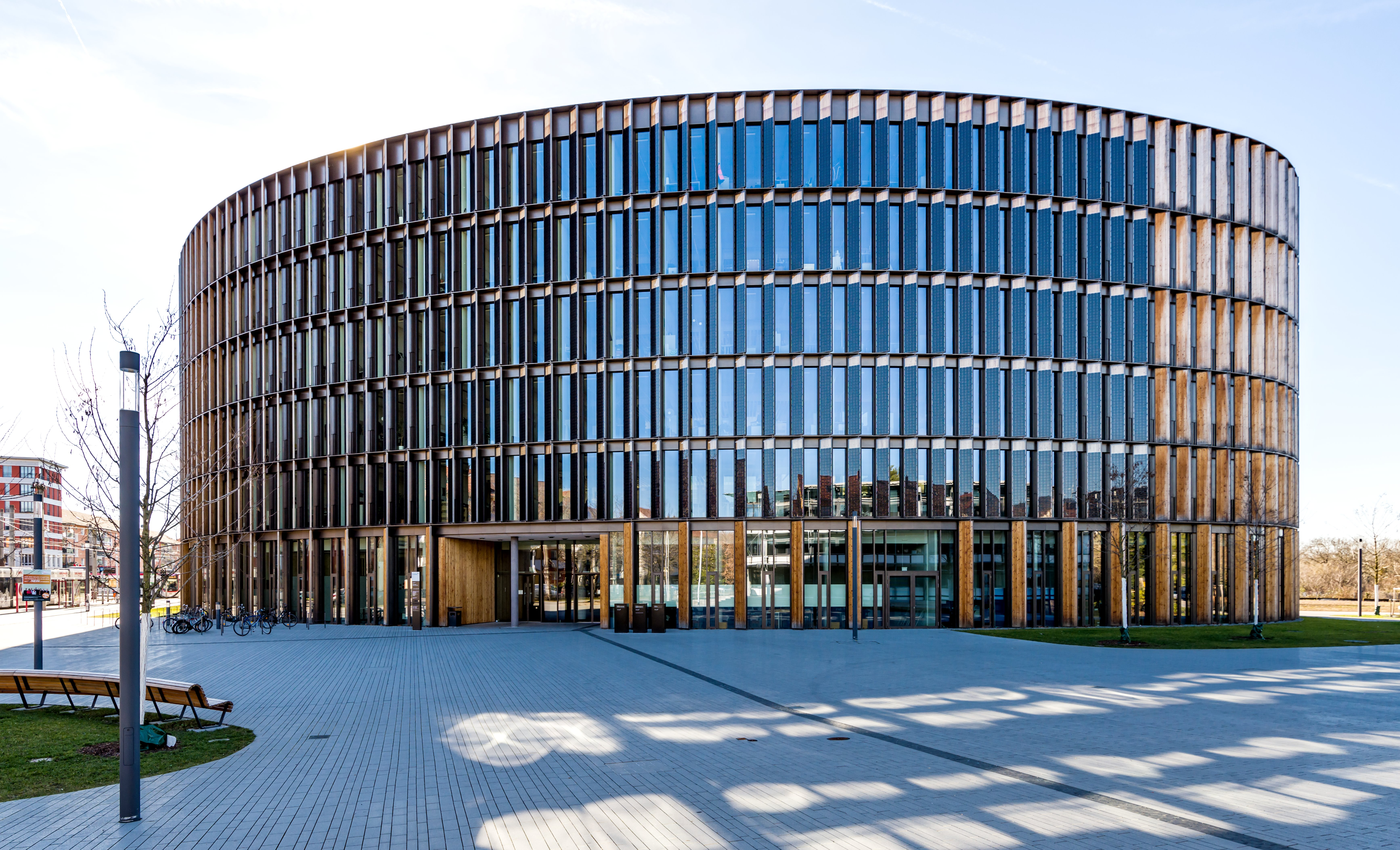 Bilder aus Freiburg im Breisgau Das neue Rathaus im Stühlinger